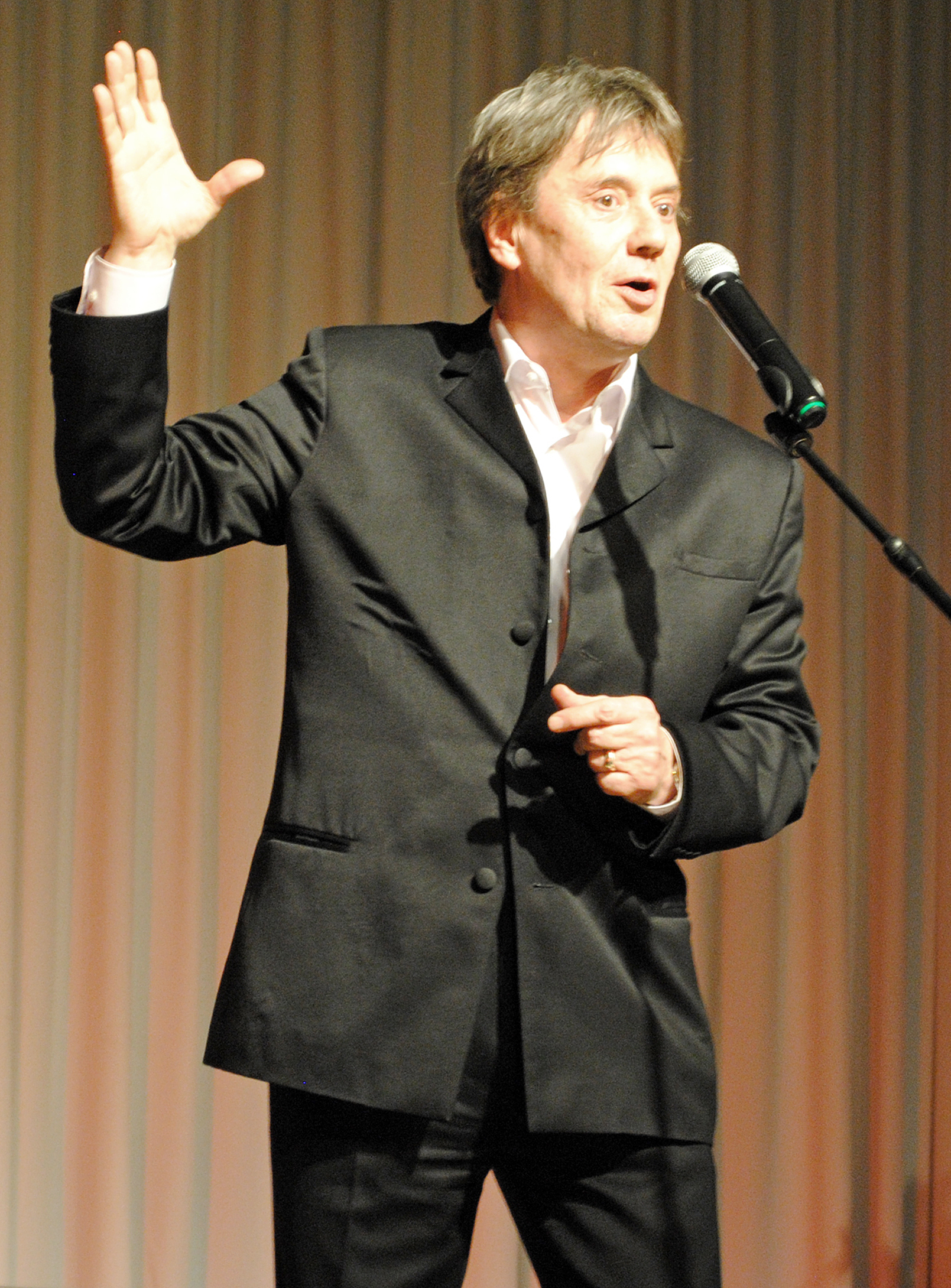 Выступление актера Владимира Еремина в киноконцертном зале "Южный" (г. Александров, Владимирская область) в рамках II Международного кинофестиваля семейных и детских фильмов «Владимирская вишня».